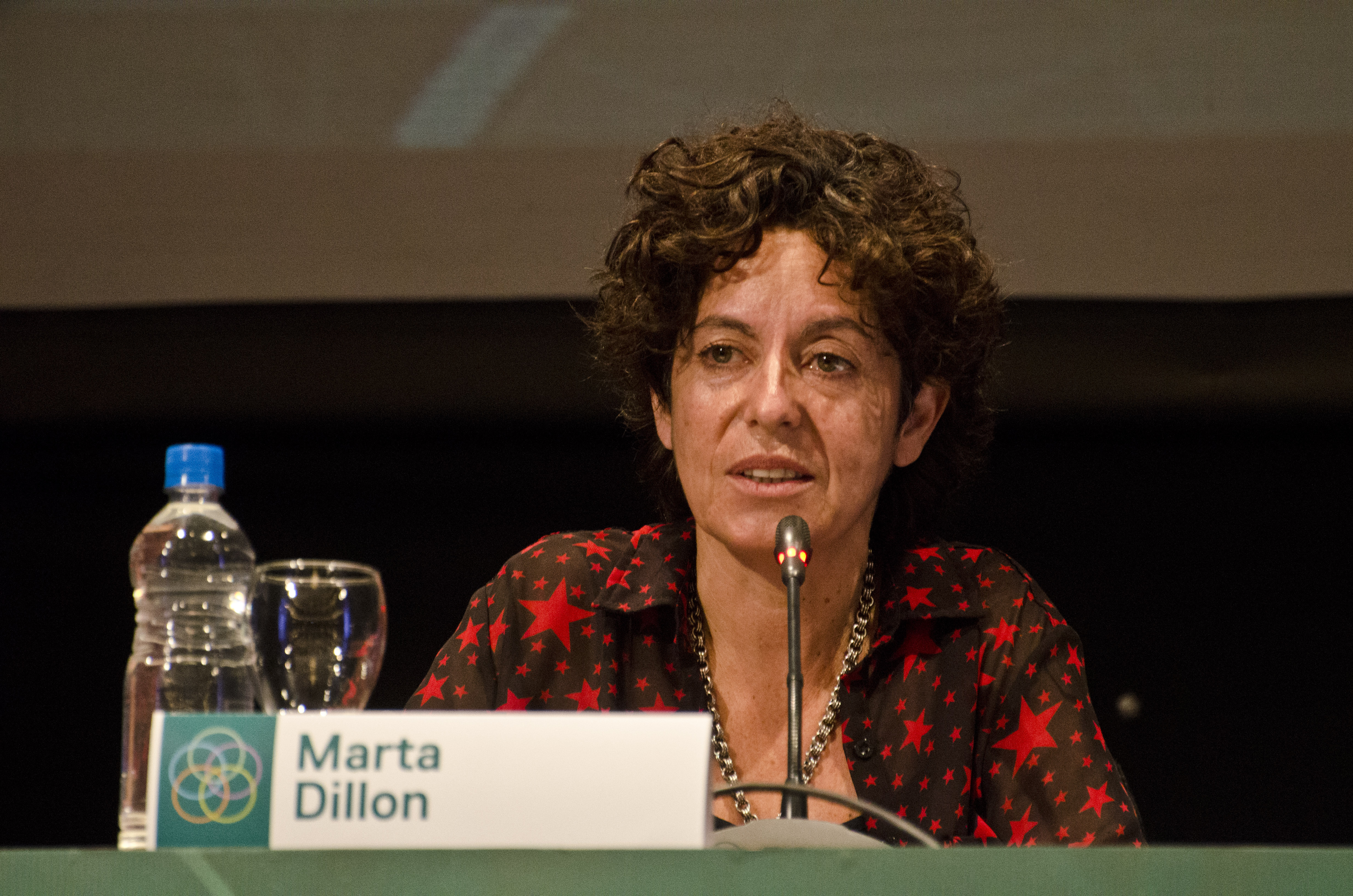 Marta Dillon en el Foro por una Nueva Independencia, Nacional y Latinoamericano (San Miguel de Tucumán, 6 de julio de 2015)